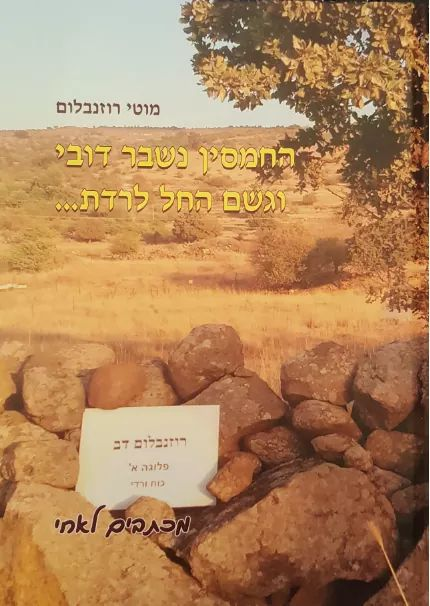 ספרו של מוטי רוזנבלום - "החמסין נשבר דובי וגשם החל לרדת..." - אוסף של מכתבים לזכרו של דוב רוזנבלום ז"ל שנפל בקרב על תל פאחר